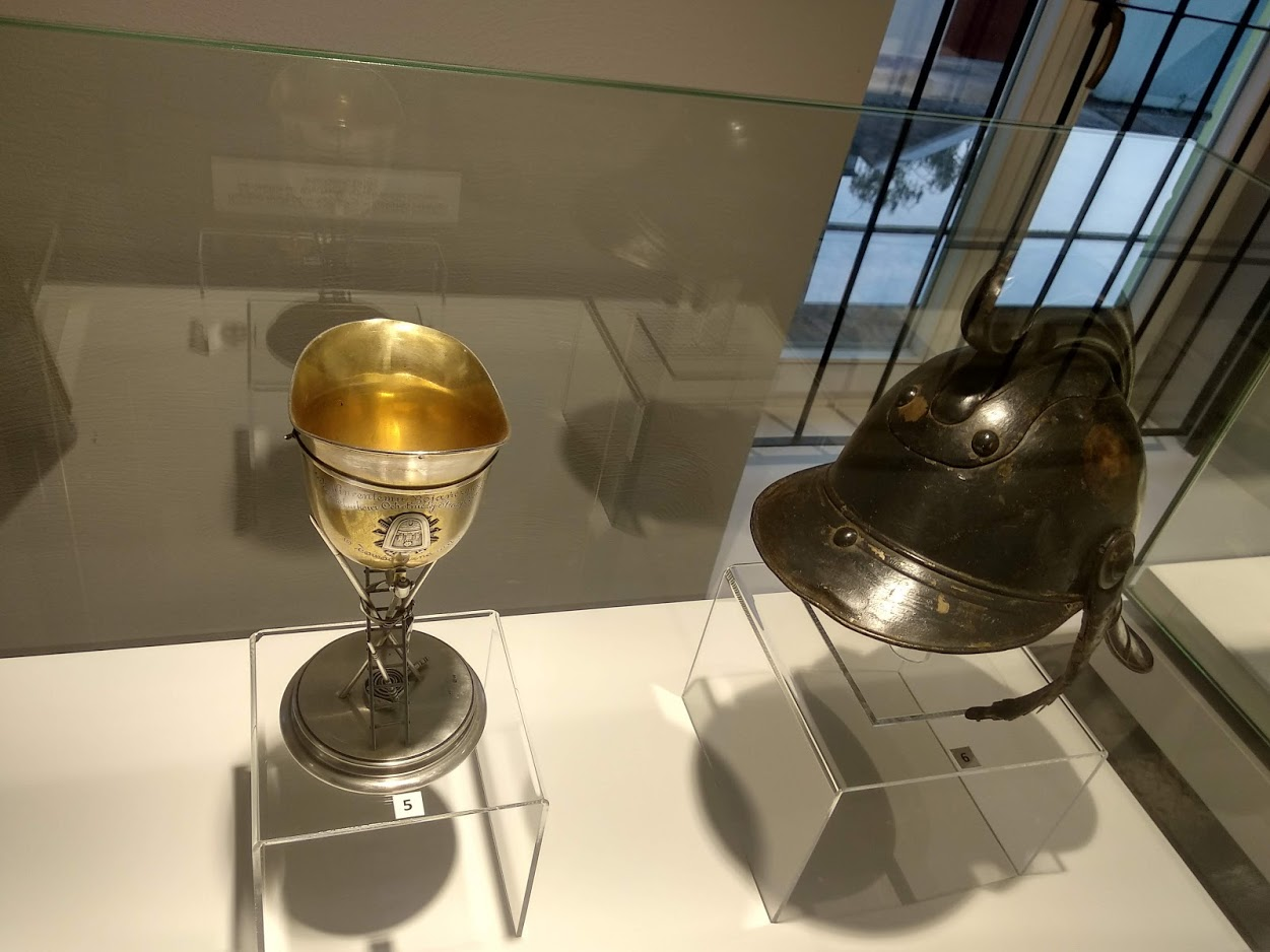 Muzeum Historii Włocławka (2019 r.)